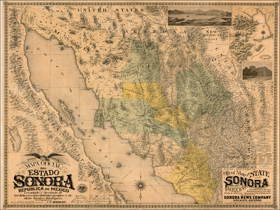 Mapa de los distritos Judiciales de Sonora en 1904